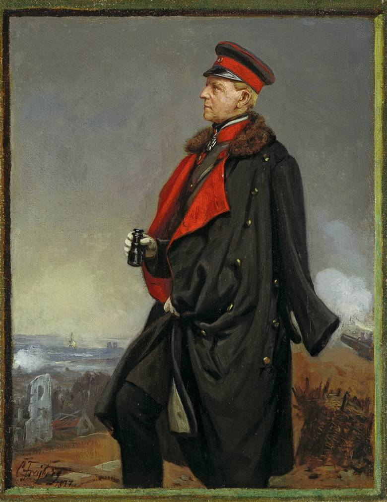 Generalfeldmarschall Helmuth Graf von Moltke.